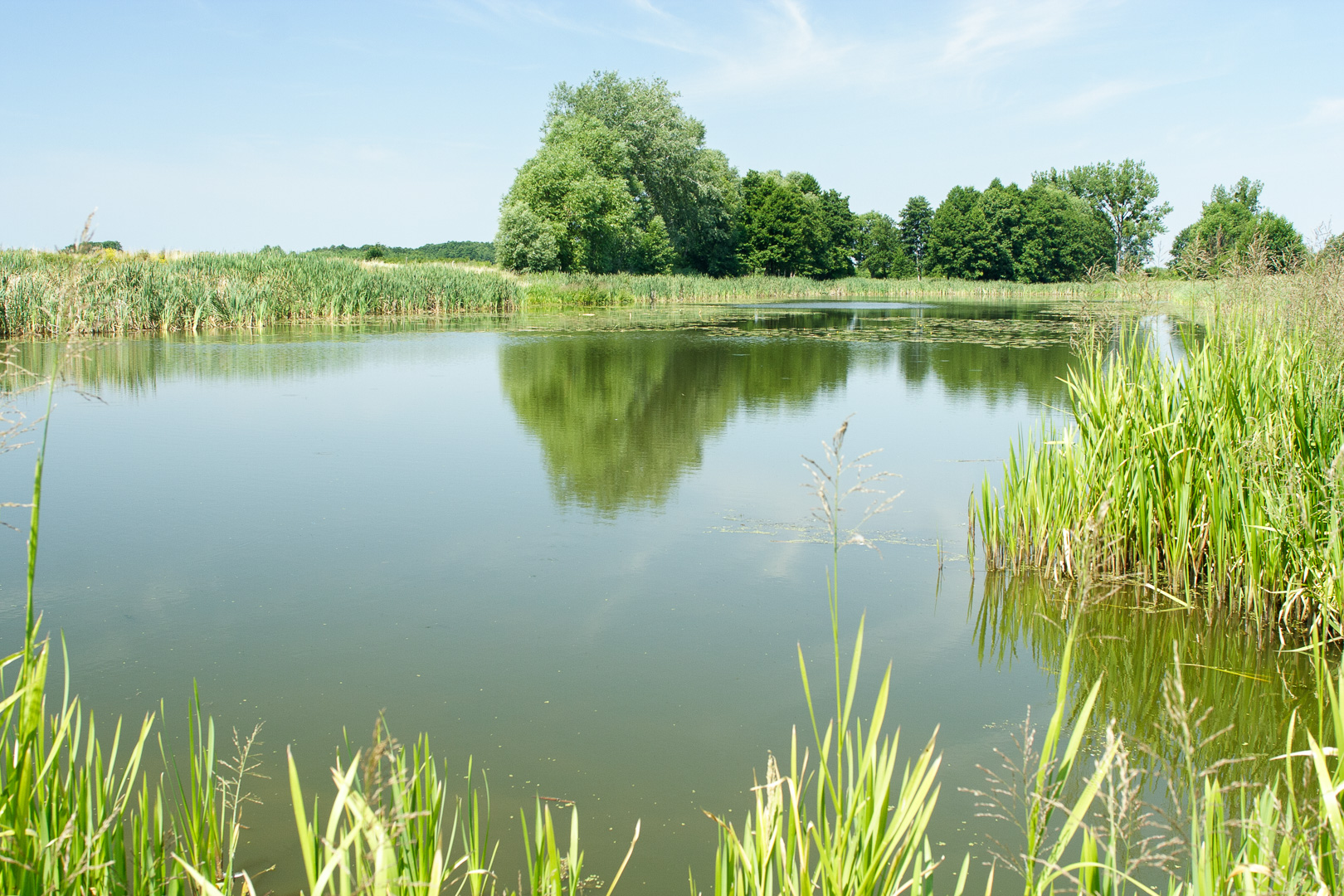 Jezioro Bielawskie Dolne. Bielawa, gmina Konstancin-Jeziorna.